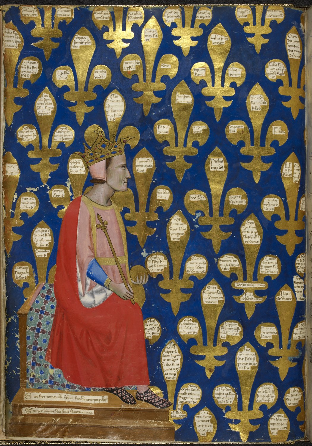 Robert von Anjou (* 1278; † 20. Januar 1343), König von Neapel. Darstellung aus einem Schreiben, welches die italienische Stadt Prato an Robert sandte. (British Library, Royal 6 E IX f. 10v)